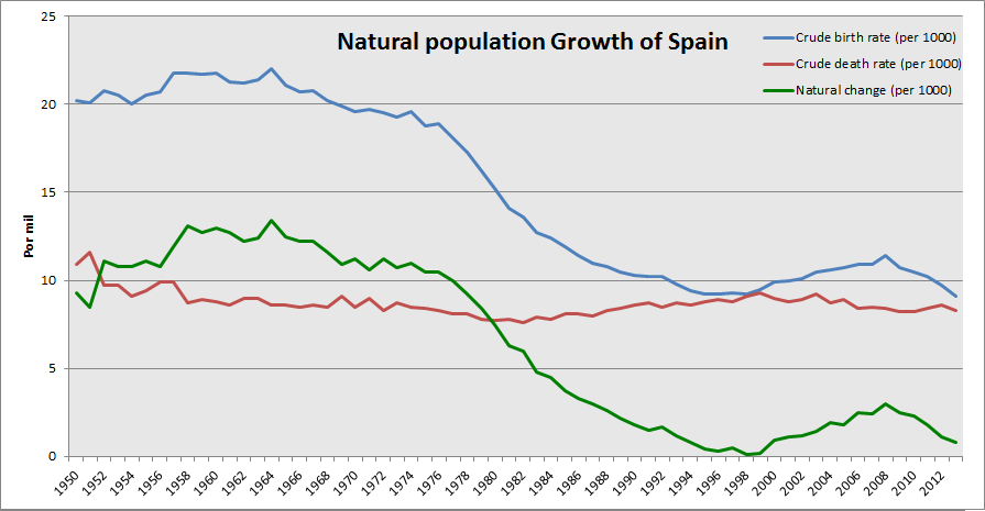 Natural population growth of Spain since 1950.